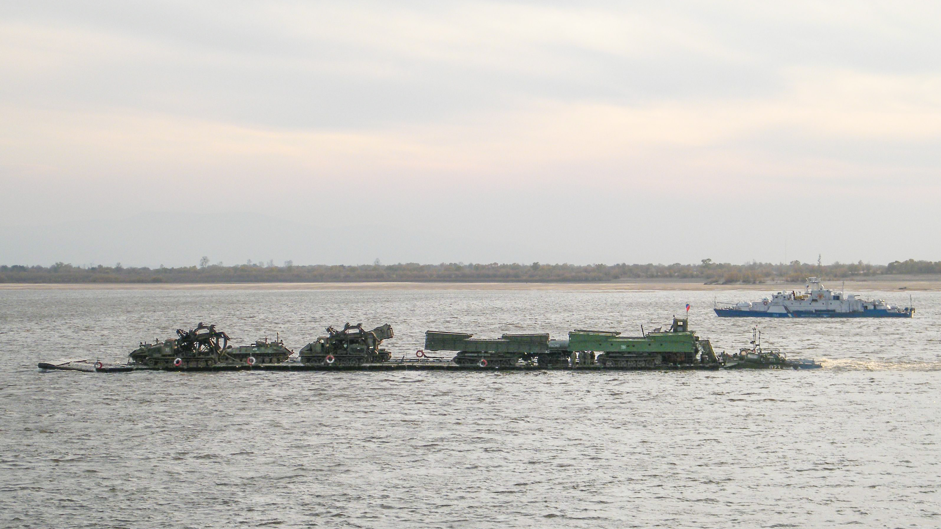 Транспортировка военной техники на пароме, собранного из комплекта ПМП на Амуре: БТМ-3, ИМР, МТУ-72 и другой, в сопровождении ПСКР проекта 1248